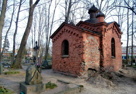 Церковь Святителя Петра, митрополита Московского, Лиепая (Либава), Северное (Гарнизонное кладбище)